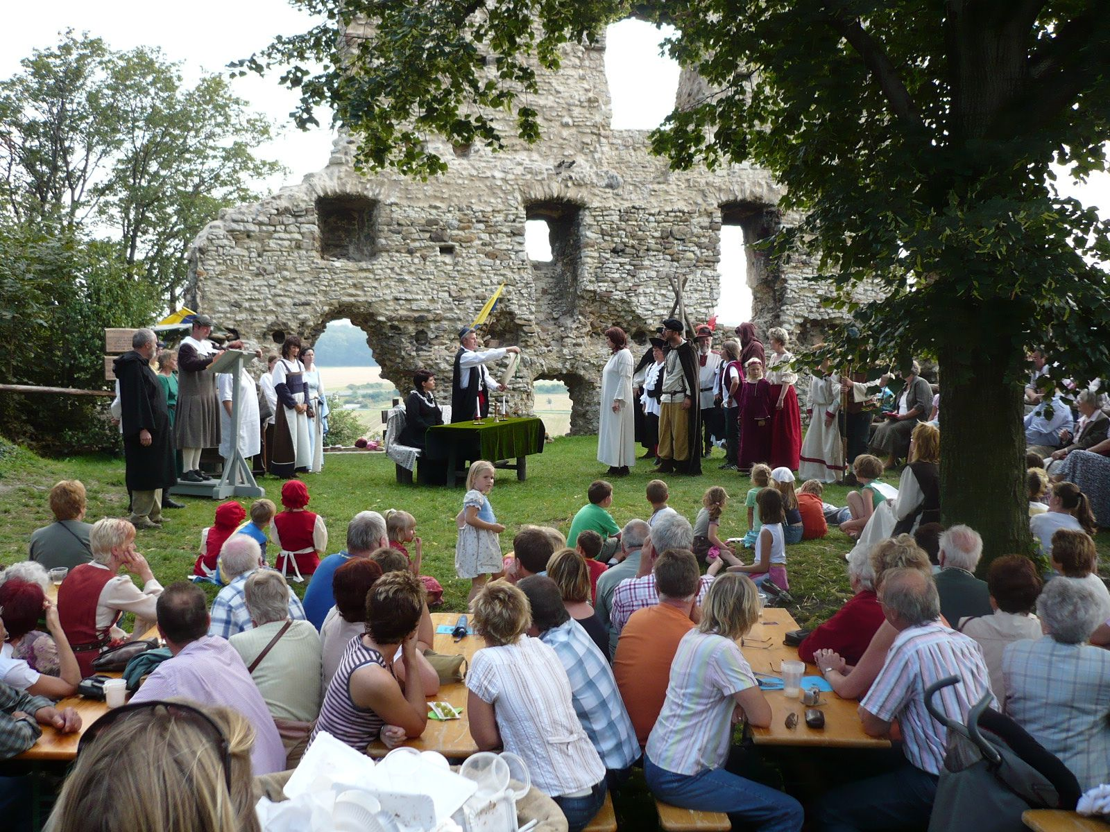 Burgbergfest Stapelburg 2007, Theateraufführung